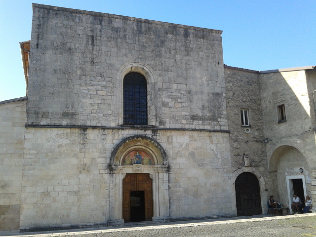 Facciata della chiesa di Santa Maria delle Grazie